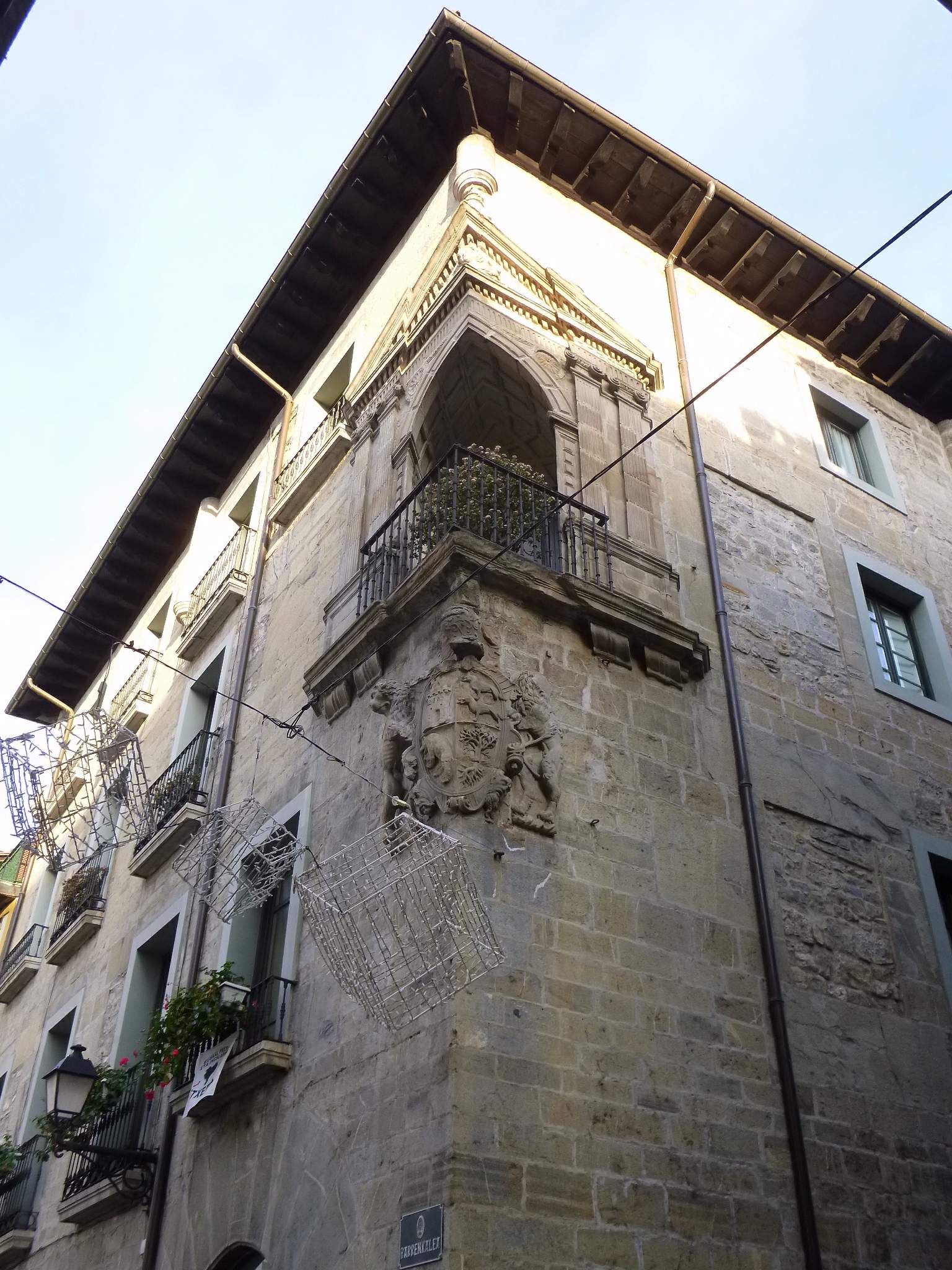 Arrese etxea (Bergara, Gipuzkoa)